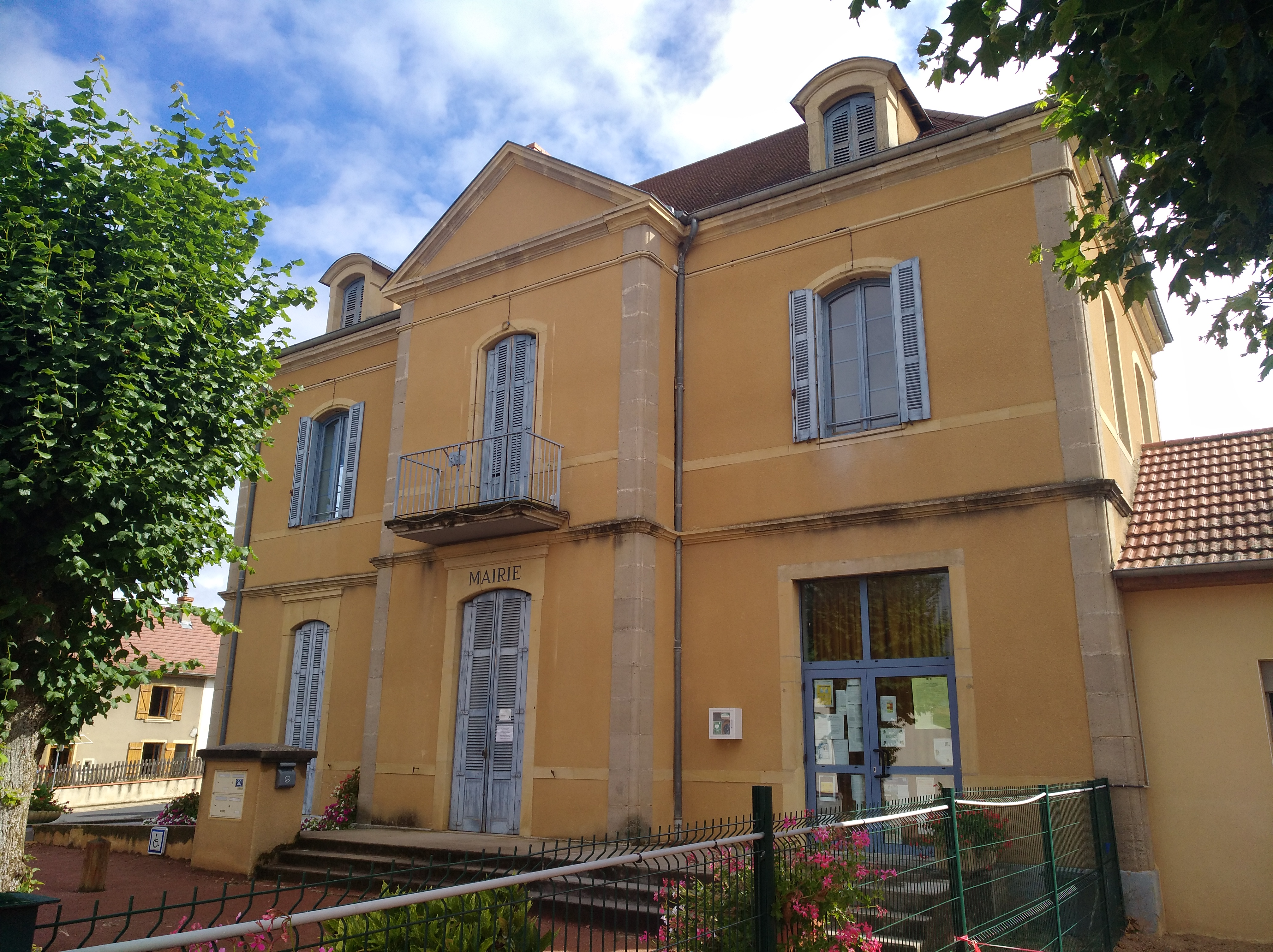 Mairie de Nandax, dans le département de la Loire.